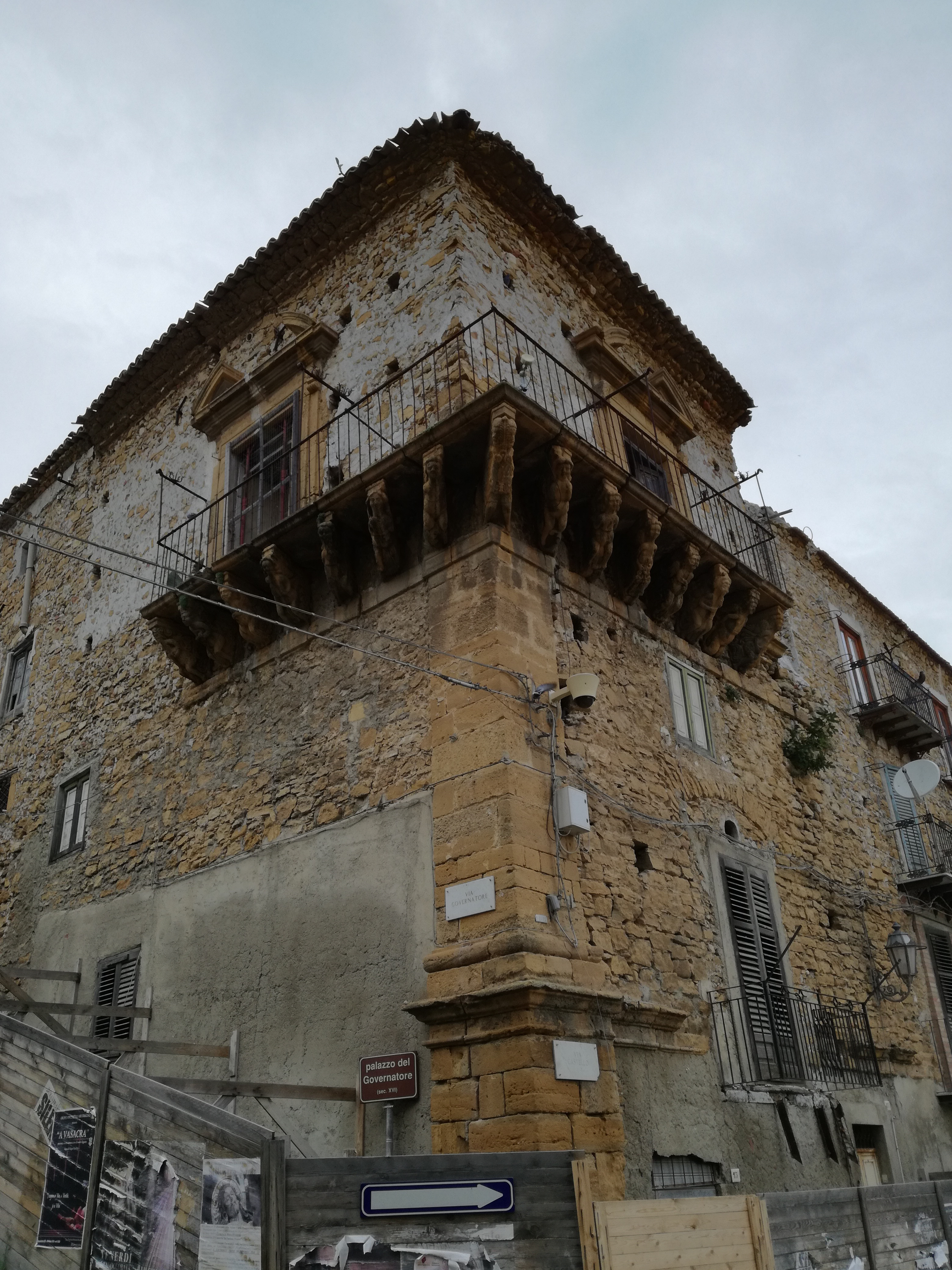 Palazzo del Governatore This is a photo of a monument which is part of cultural heritage of Italy.